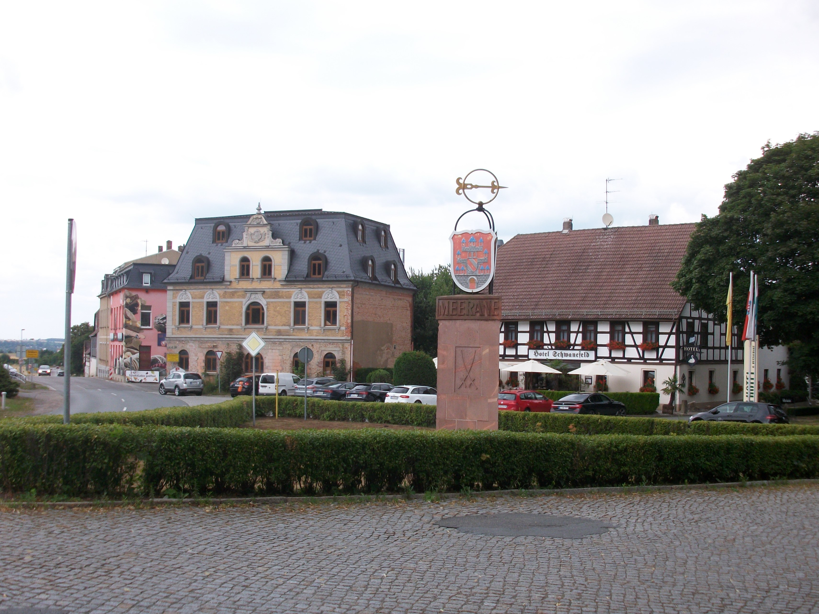 Meerane, Hotel Schwanefeld mit ehem. Posthalterei (links)